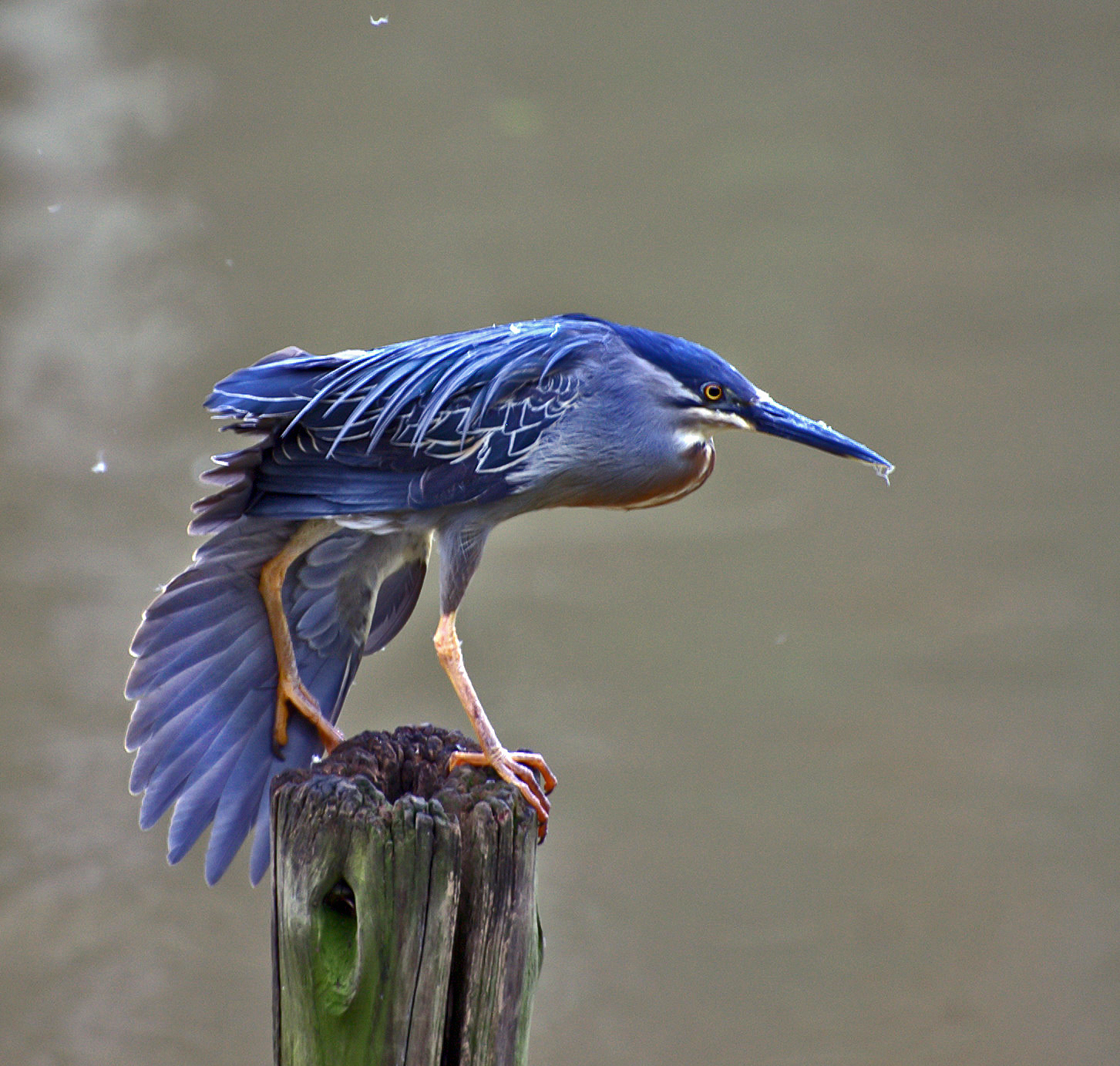 Butorides striata, Horto Florestal em São Paulo